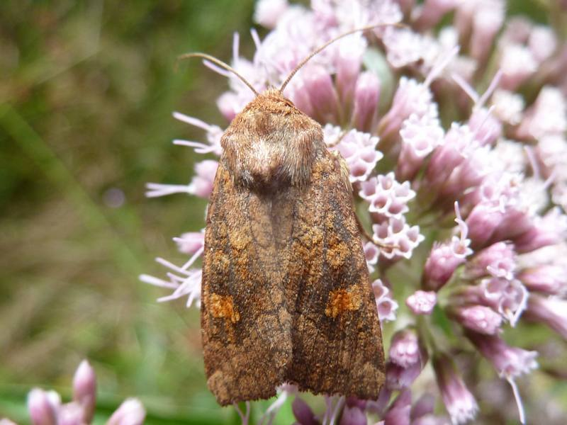 Amphipoea lucens, location: The Netherlands - Engbertsdijksvenen - Zuid - Nieuwe Leidijk